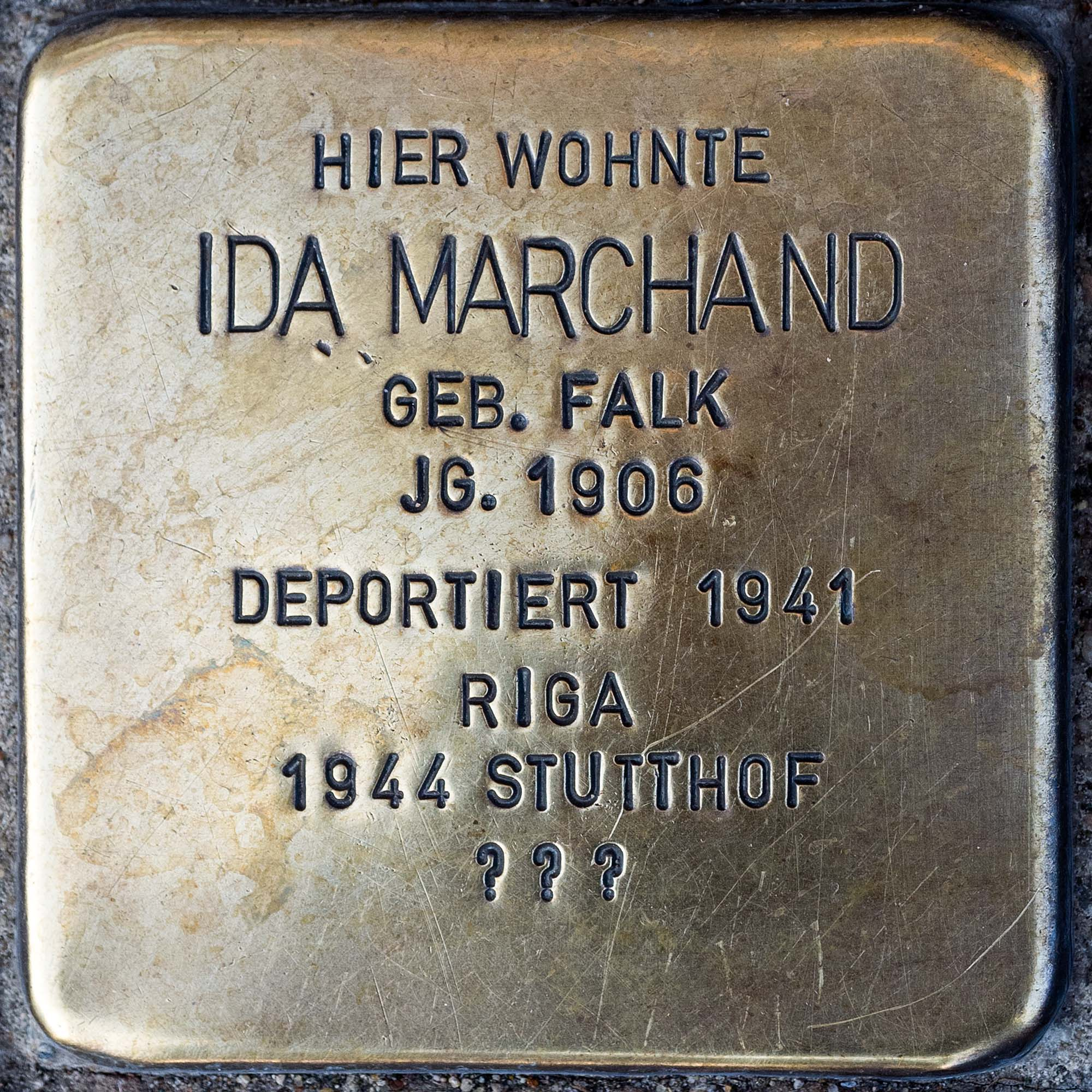 2016 Stolpersteine Toevo Ida Marchand